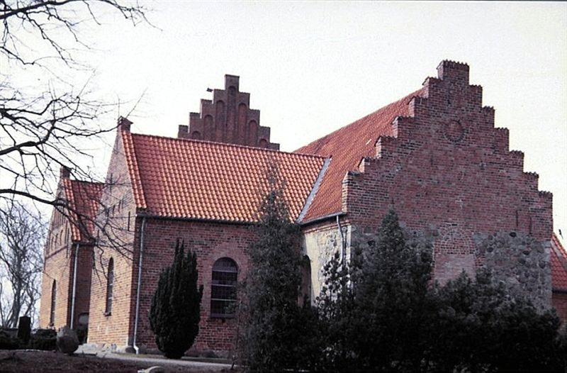 Kirke Stillinge Kirke i Danmark. Kirke Stullinge kirke